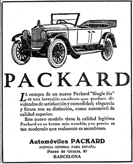 Packard Single Six inserzione del 23.8.1923 su La Vanguardia di Barcellona